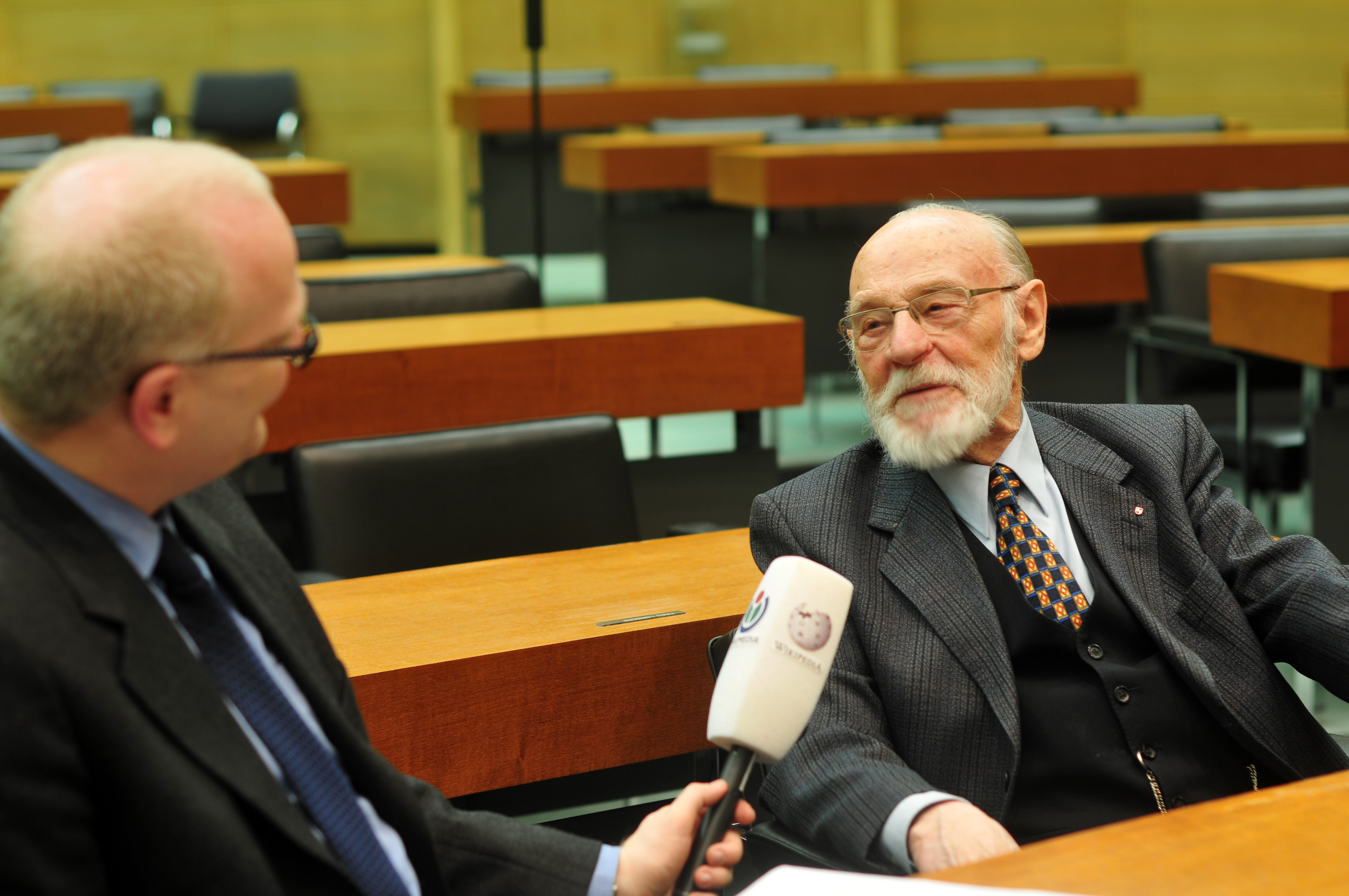 Landtag Niedersachsen, Hannover Wikipedia im Landtag – Niedersachsen 19. März 2013 in HannoverDieses Bild entstand während eines Fototermins im Niedersächsischen Landtagsgebäude in Hannover vor dem geplanten Abriß und Neubau bis 2017. Die Landtagsverwaltung hat uns gestattet, alle Räume zu dokumentieren.